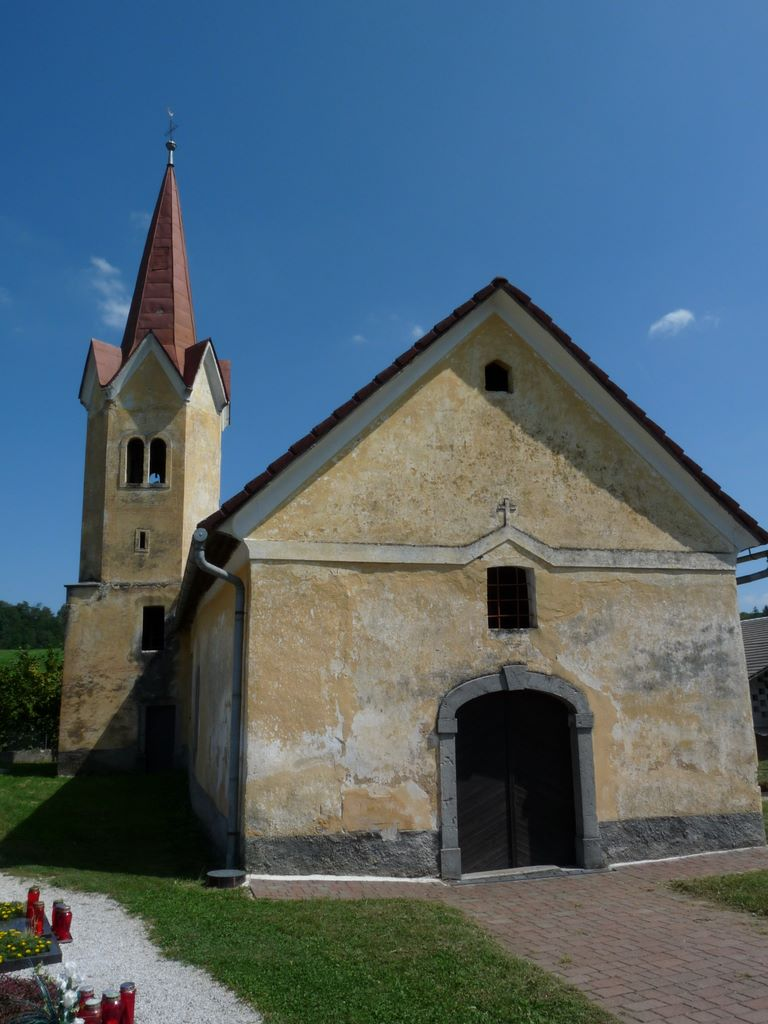 Sveti Mihael v Dolenjih Raduljah